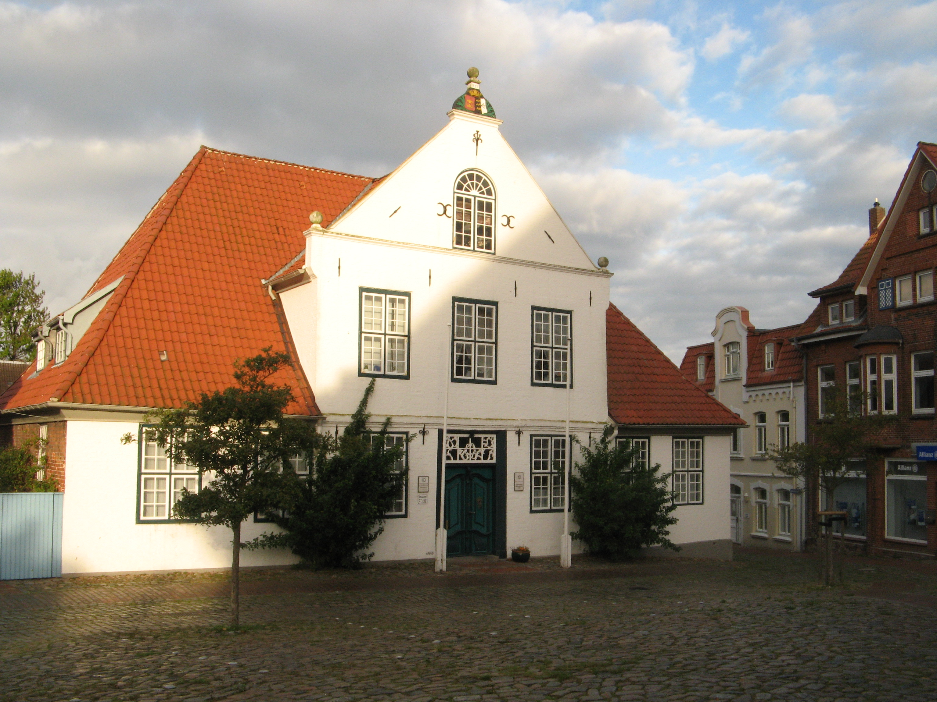 amstverwaltung amt klg wesselburen land, build in 1737